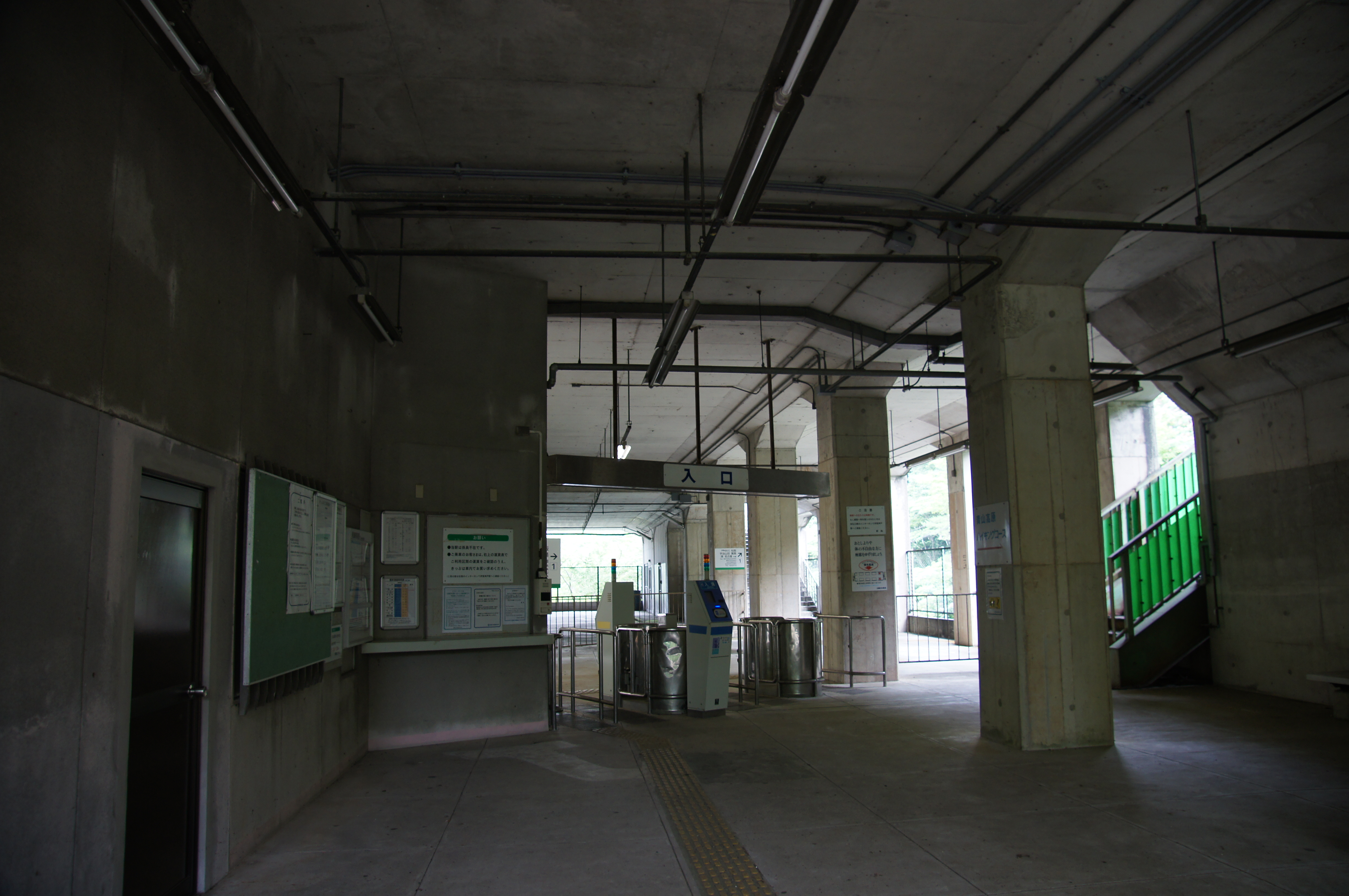 西青山駅改札